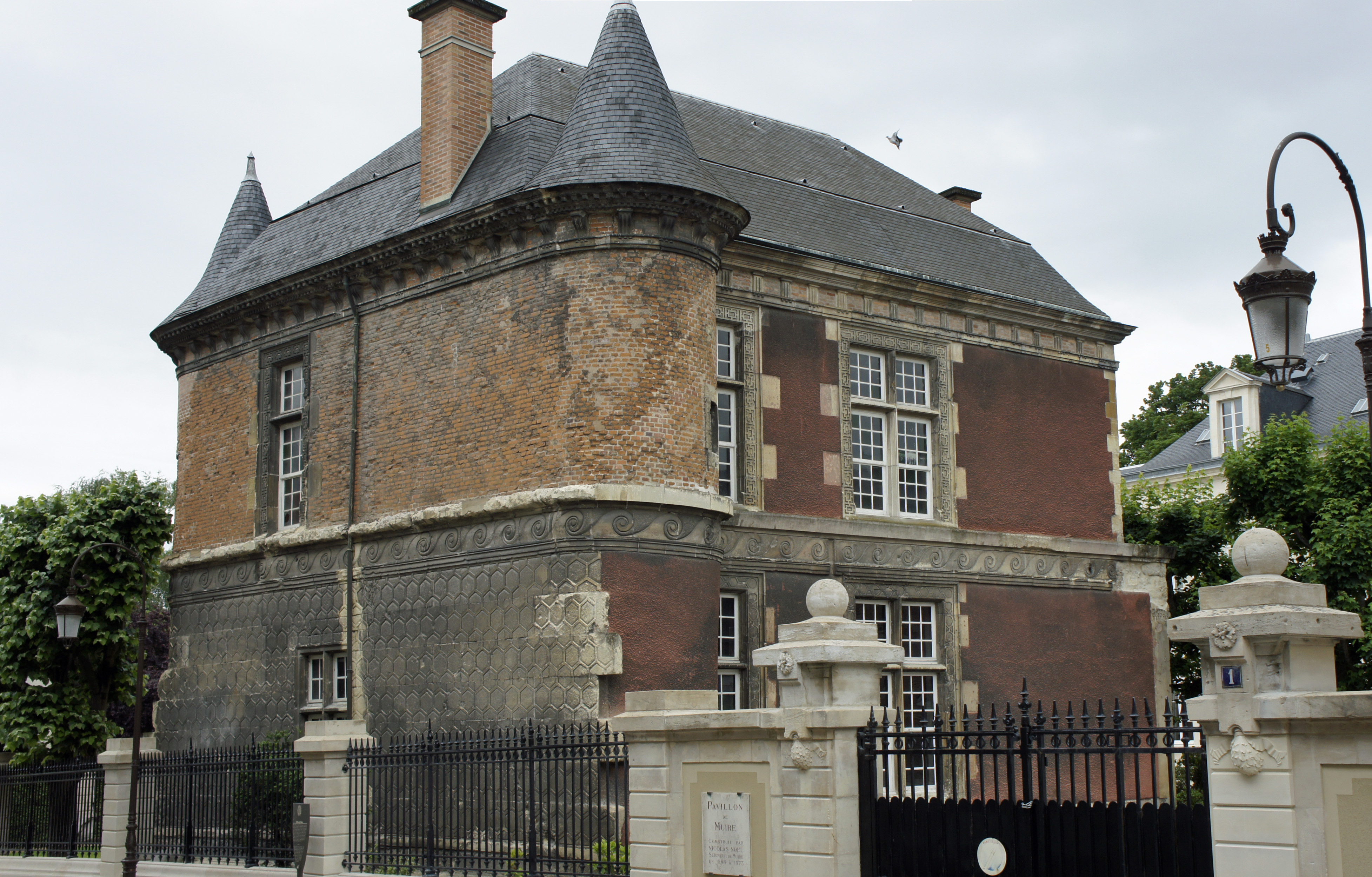 vue du Pavillon_de_Muire, monument historique de Reims construit par Nicolas Noel, seigneur de Muire.